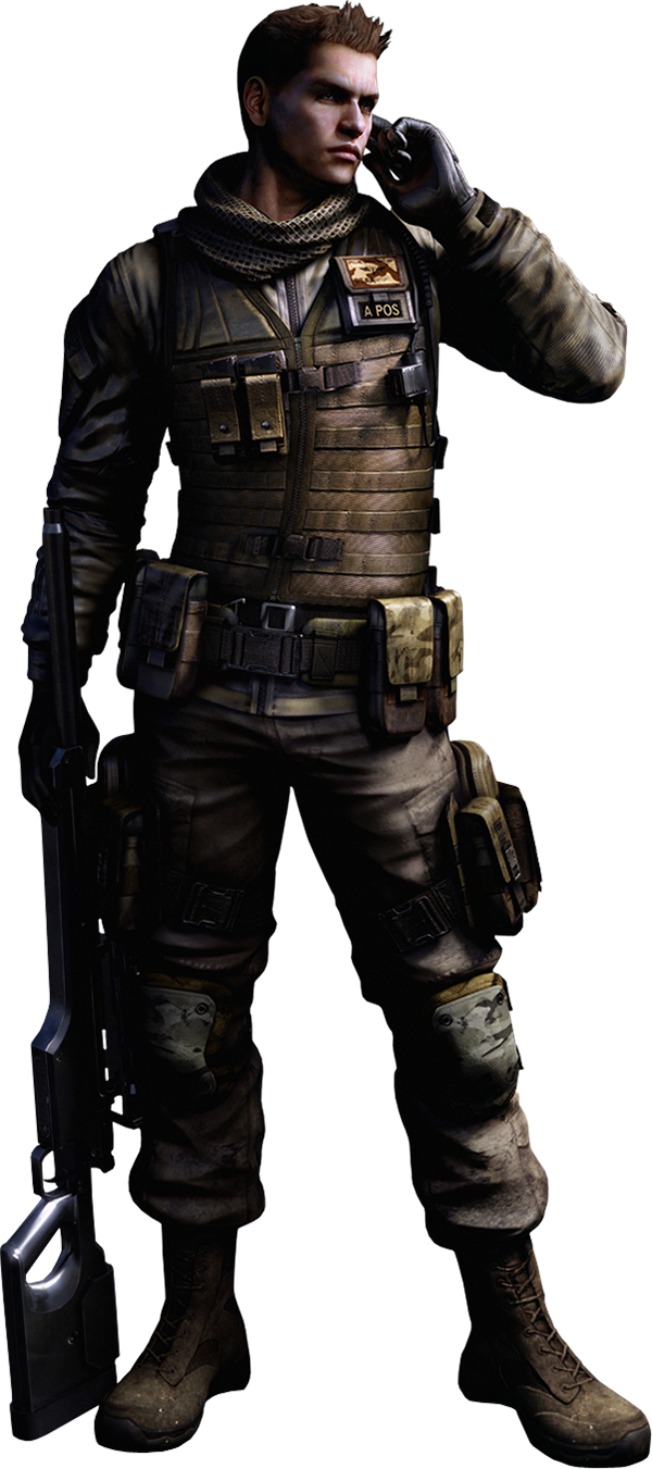 پیرز نیوانس / شخصیت بازی رایانه‌ای رزیدنت ایول